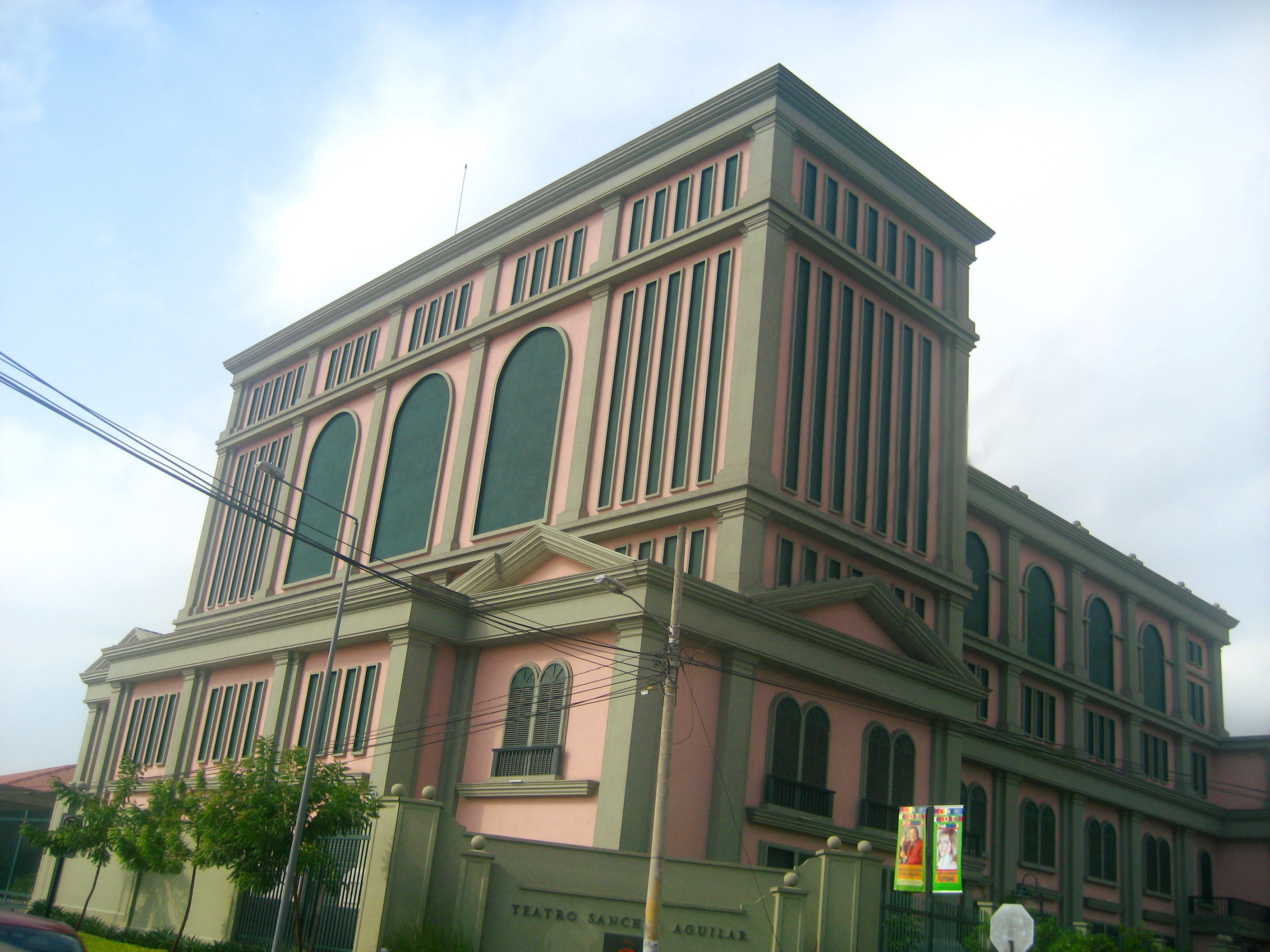 Foto del Teatro Sánchez Aguilar